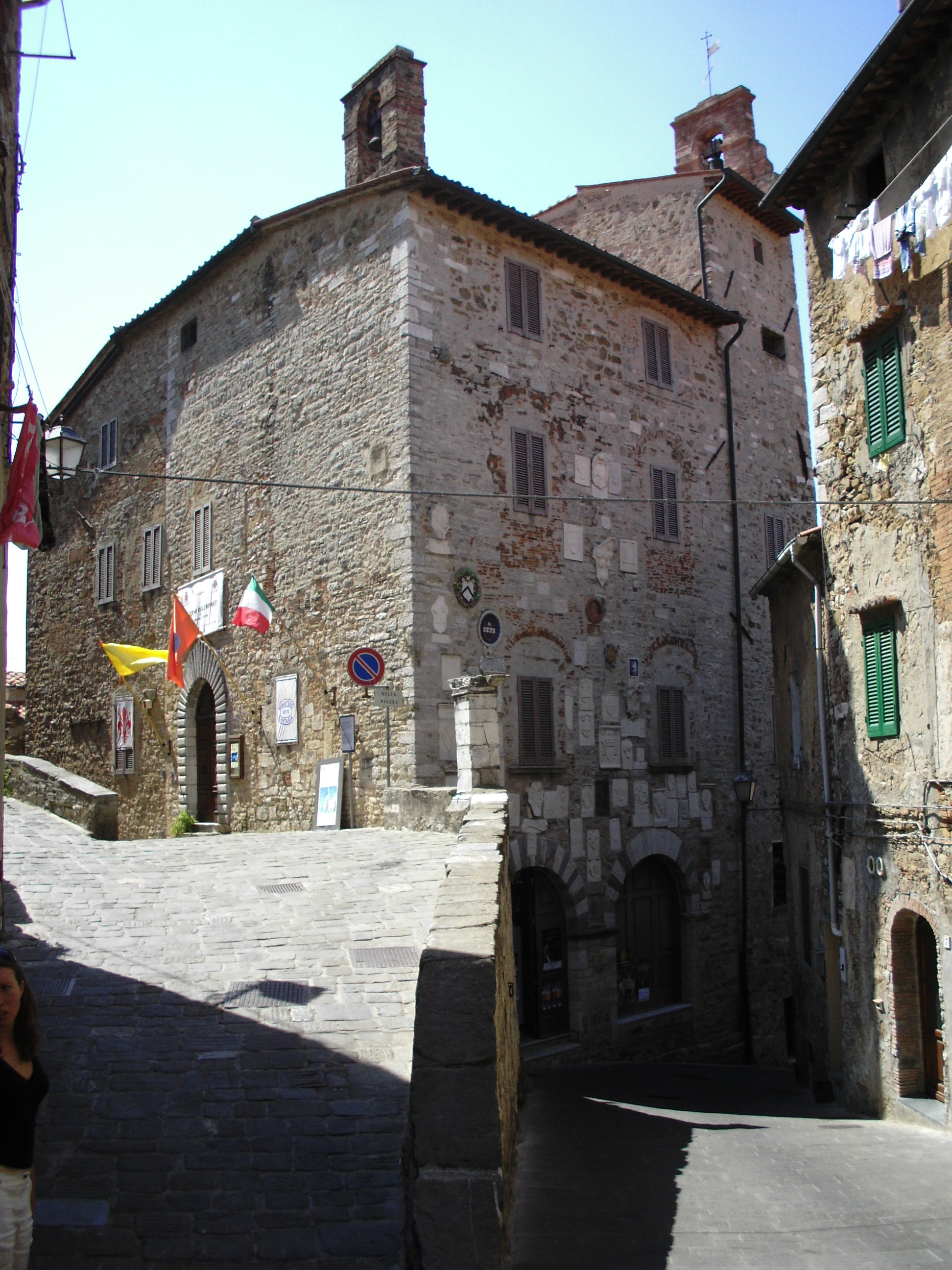 Campiglia Marittima, Palazzo Pretorio